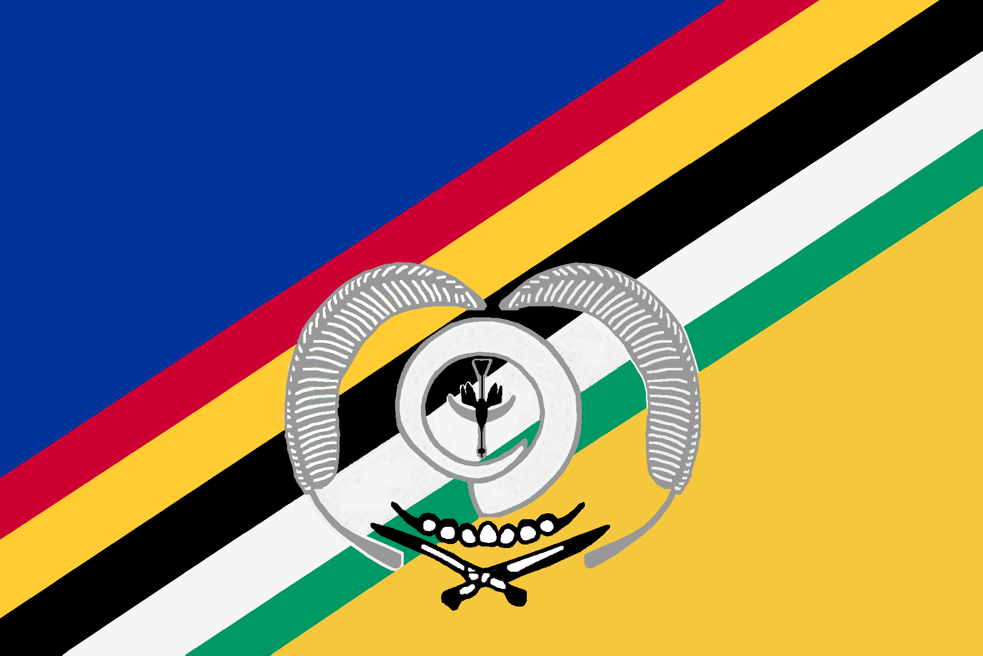 Flag of Malampa, Vanuatu